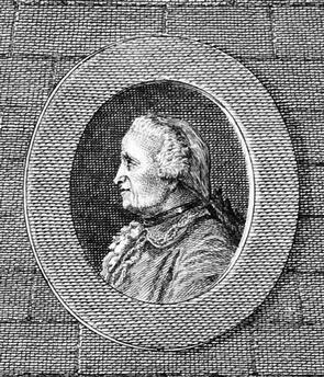 Detalle del grabado en su honor por Francisco de Goya, 1788. Editado por Pierre-Philippe Choffard. Biblioteca Nacional de España, Madrid.